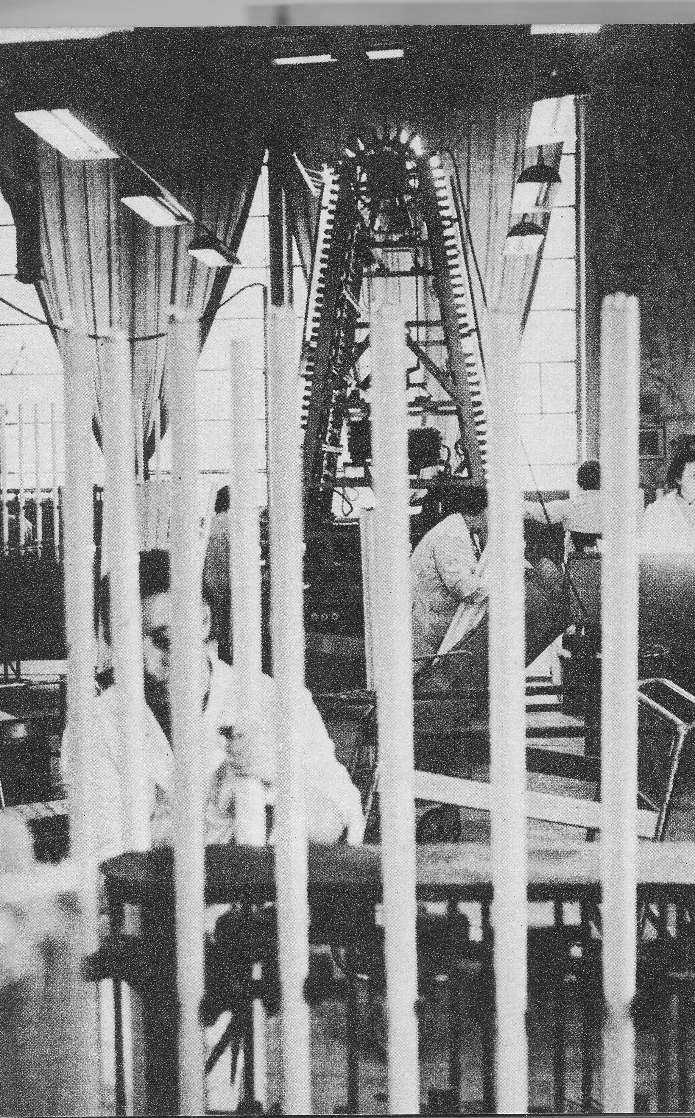 Produkcja świetlówek w Zakładach Wytwórczych Lamp Elektrycznych im. Róży Luksemburg w Warszawie